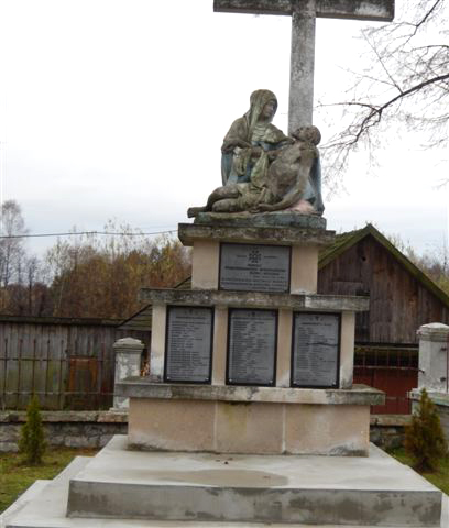 polish-memorial-brusno